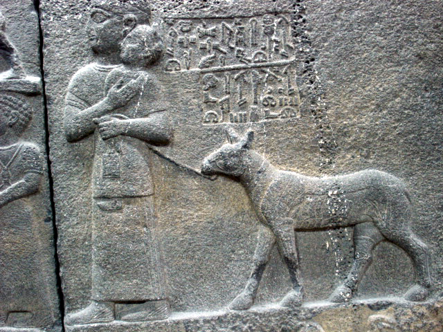 Detalle asirio en el Museo Arqueológico de Ankara My own work Asirian archeology at the Archeological Museum of Ankara, Turkey 2004